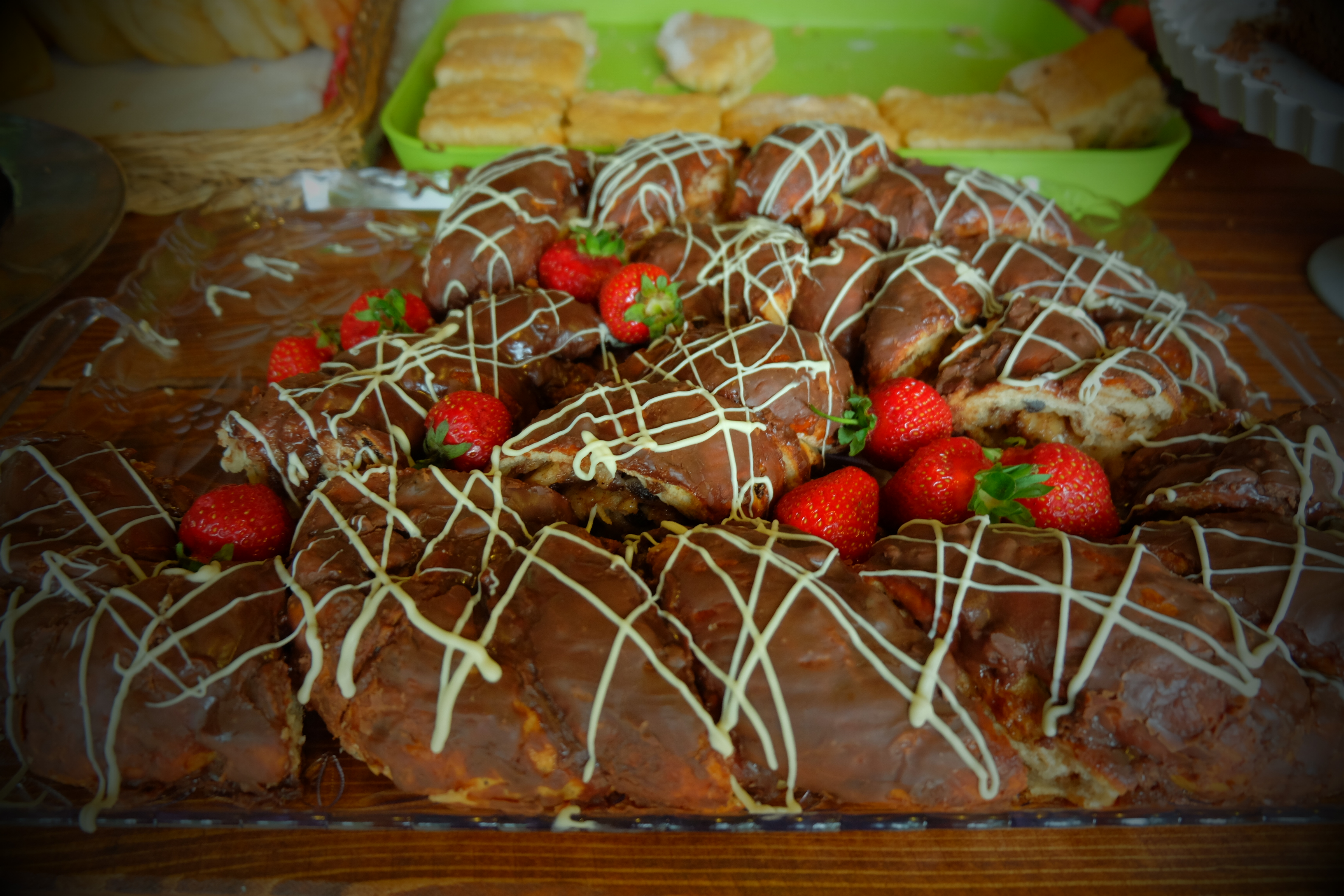 Kalju-kohviku küpsetised - kringel